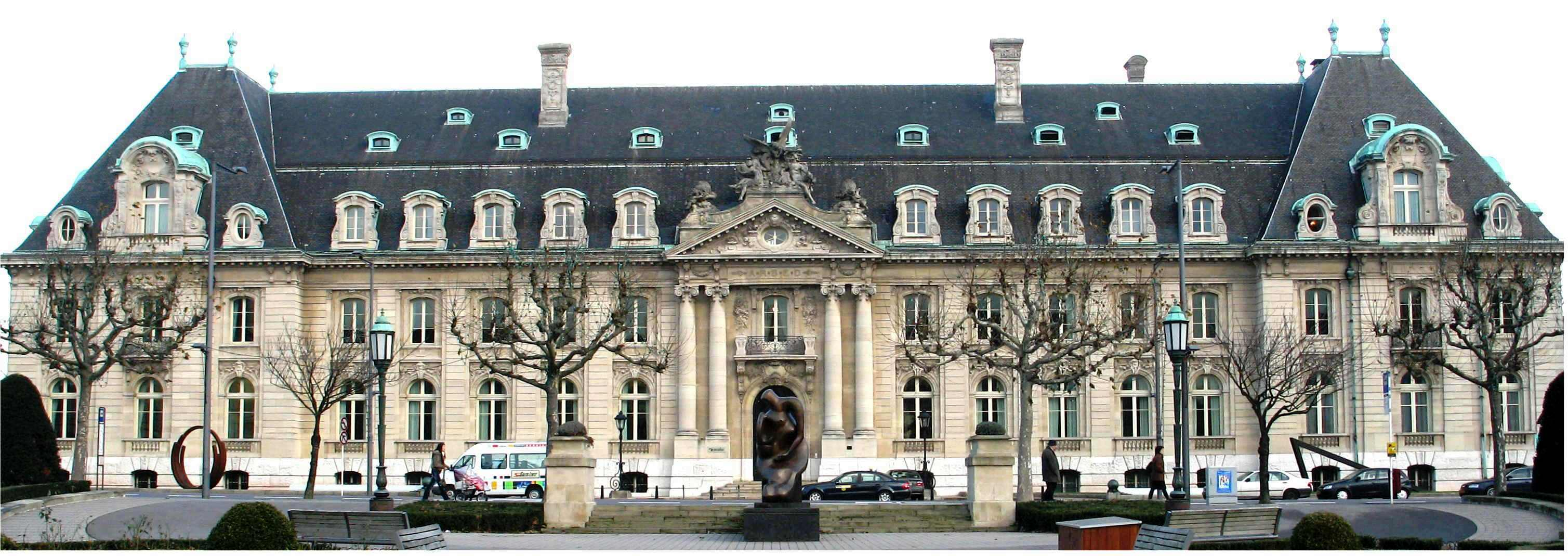 De Sëtz vun der Arcelor an der Stad Lëtzebuerg